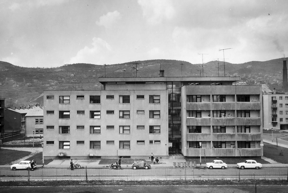 Óbudai kísérleti lakótelep garzonlakásos háza, Budapest III. (tervezte Rimanóczy Jenő, épült 1960-1961-ben)